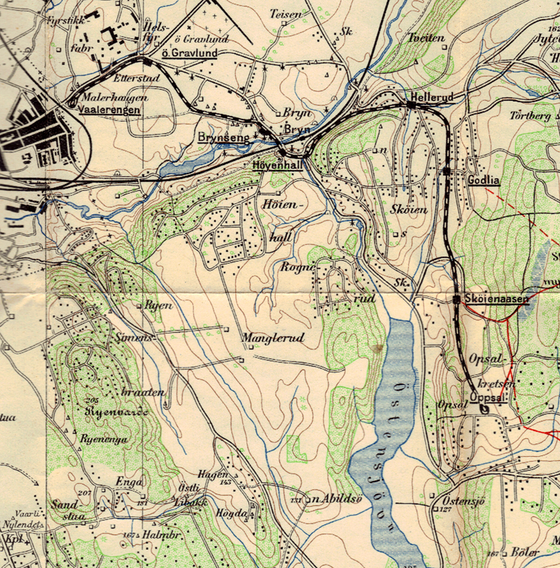 Kart fra 1928 som viser Østensjøbanens opprinnelige trasé mellom Vålerenga og Oppsal.